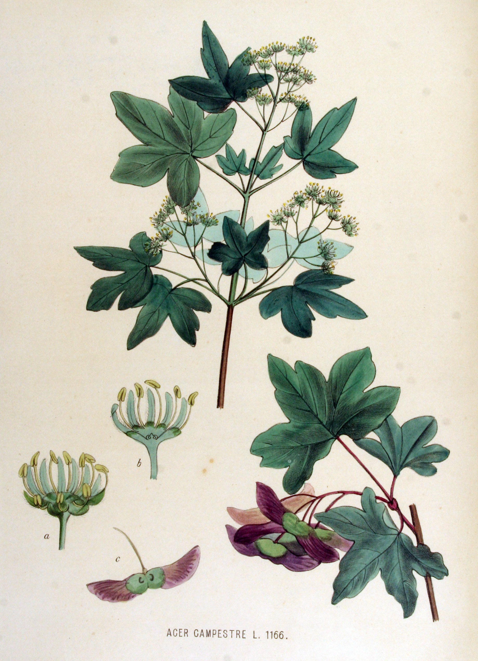 Acer campestre L.